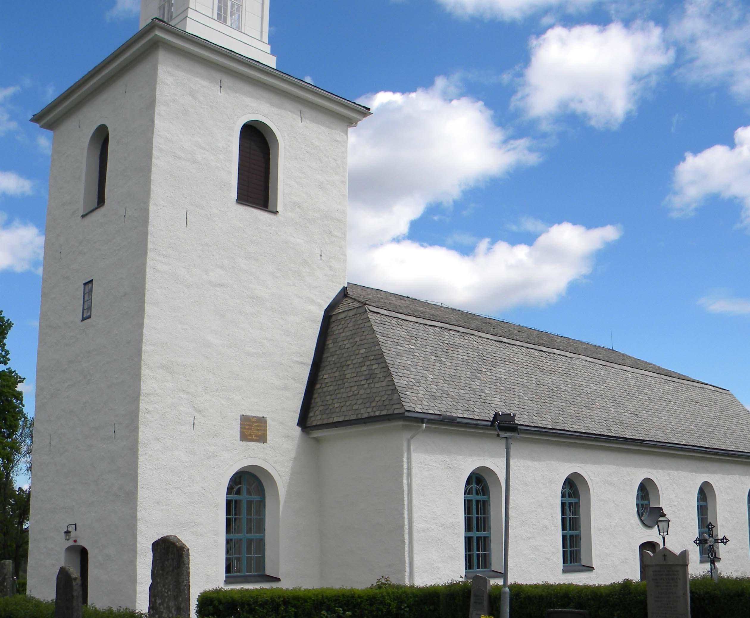 Frykeruds kyrka